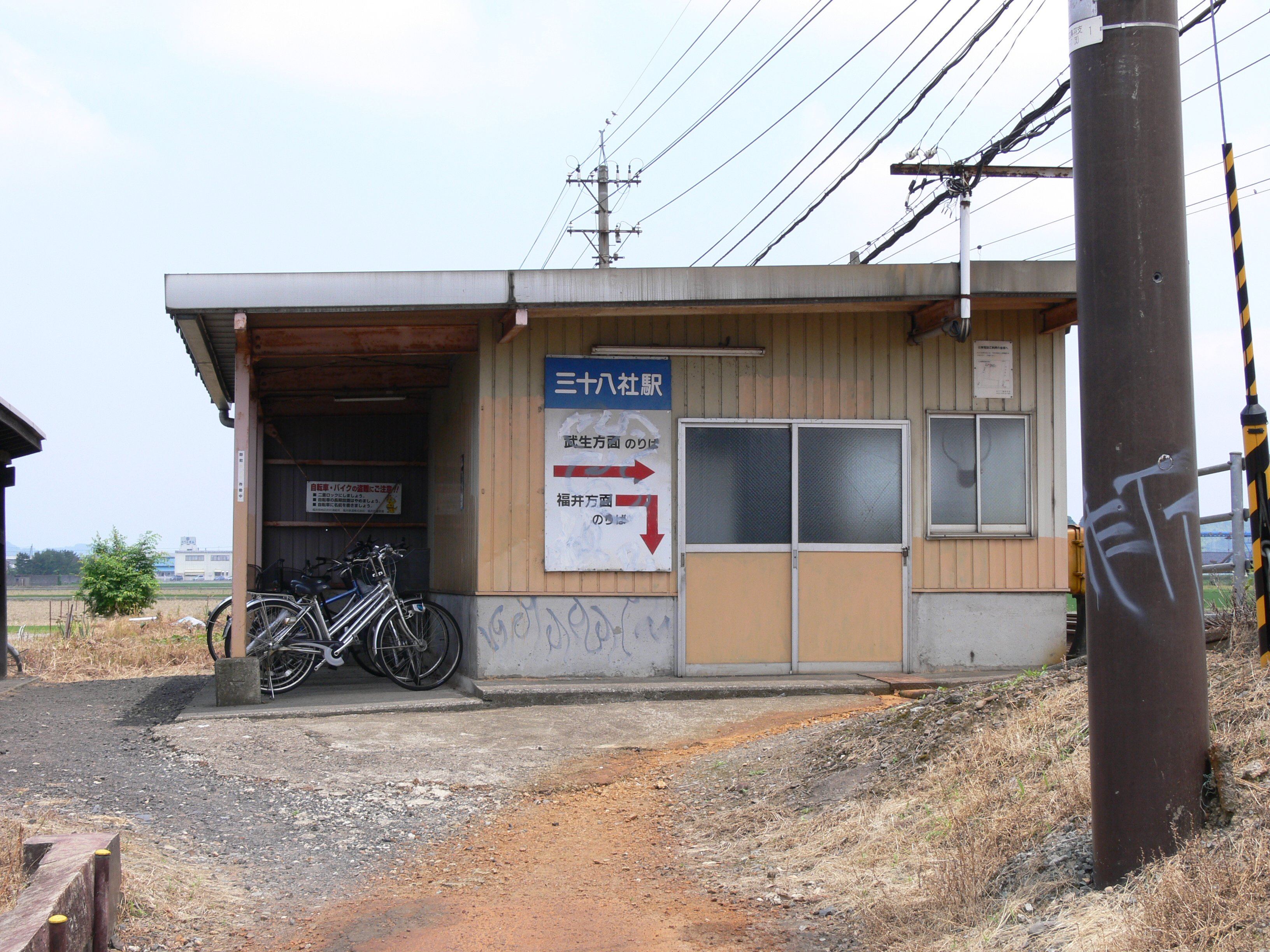 Sanjuhassha Station